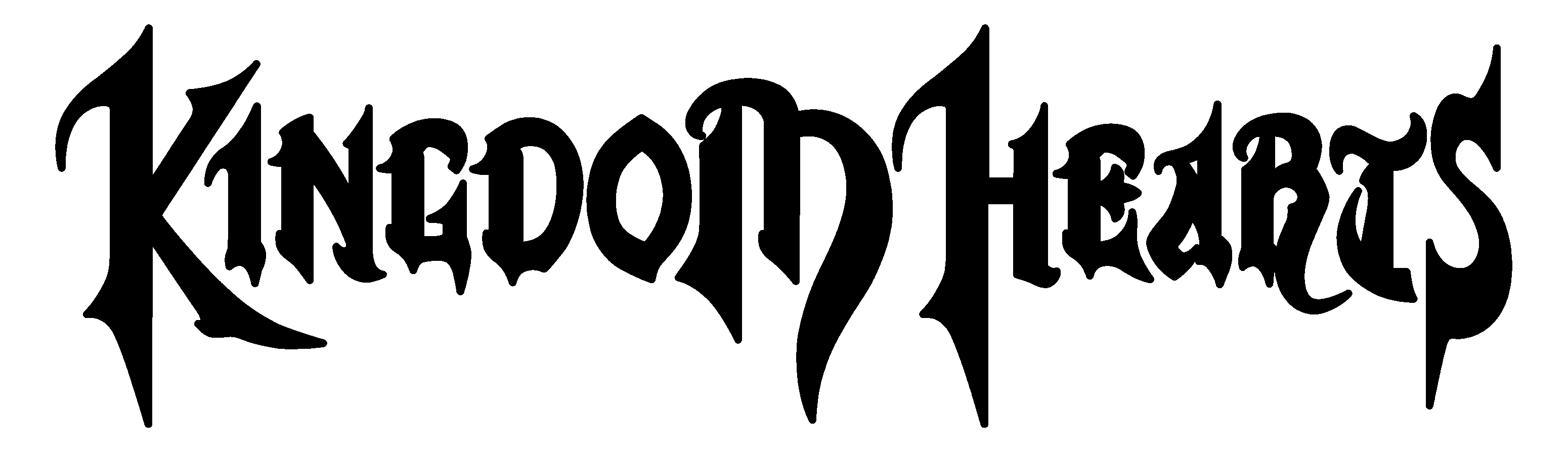 Scritta del videogioco di ruolo di tipo action RPG Kingdom Hearts. Storia: La prima versione di scrittura del logo della serie e stato usato per i capitoli di: Kingdom Hearts; Final Mix; Chain of Memories; Re:Chain of Memories; V CAST e 1.5 ReMIX.